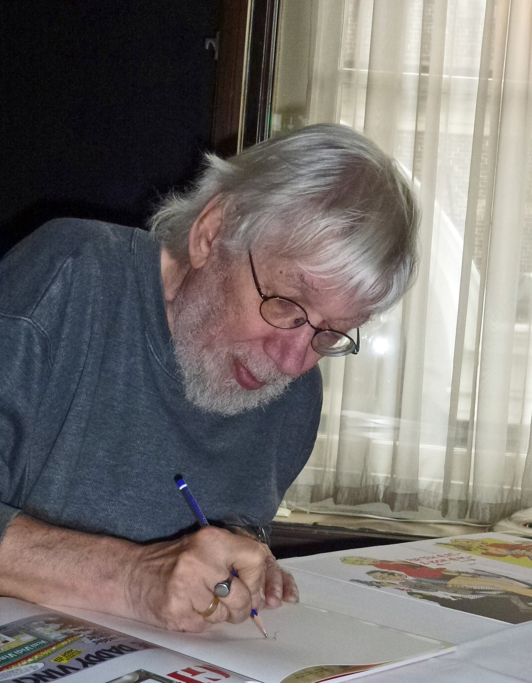 Nederlandse striptekenaar. Gefotografeerd tijdens Strips op de markt in Gouda